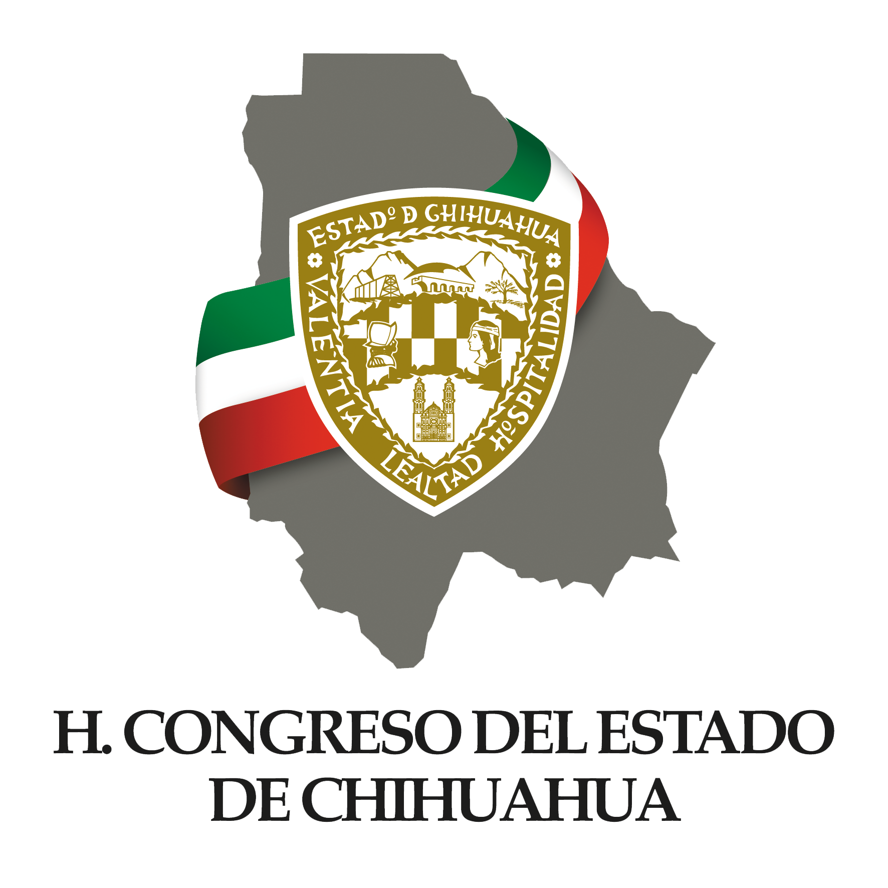 Escudo del H. Congreso del Estado de Chihuahua.